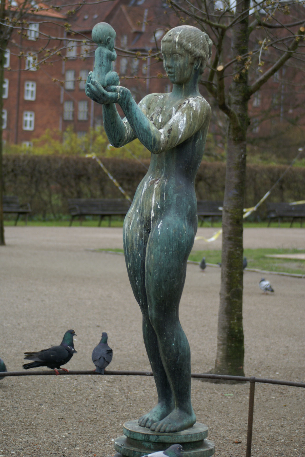 Venus med æblet, Enghaveparken, København, opstillet 1929